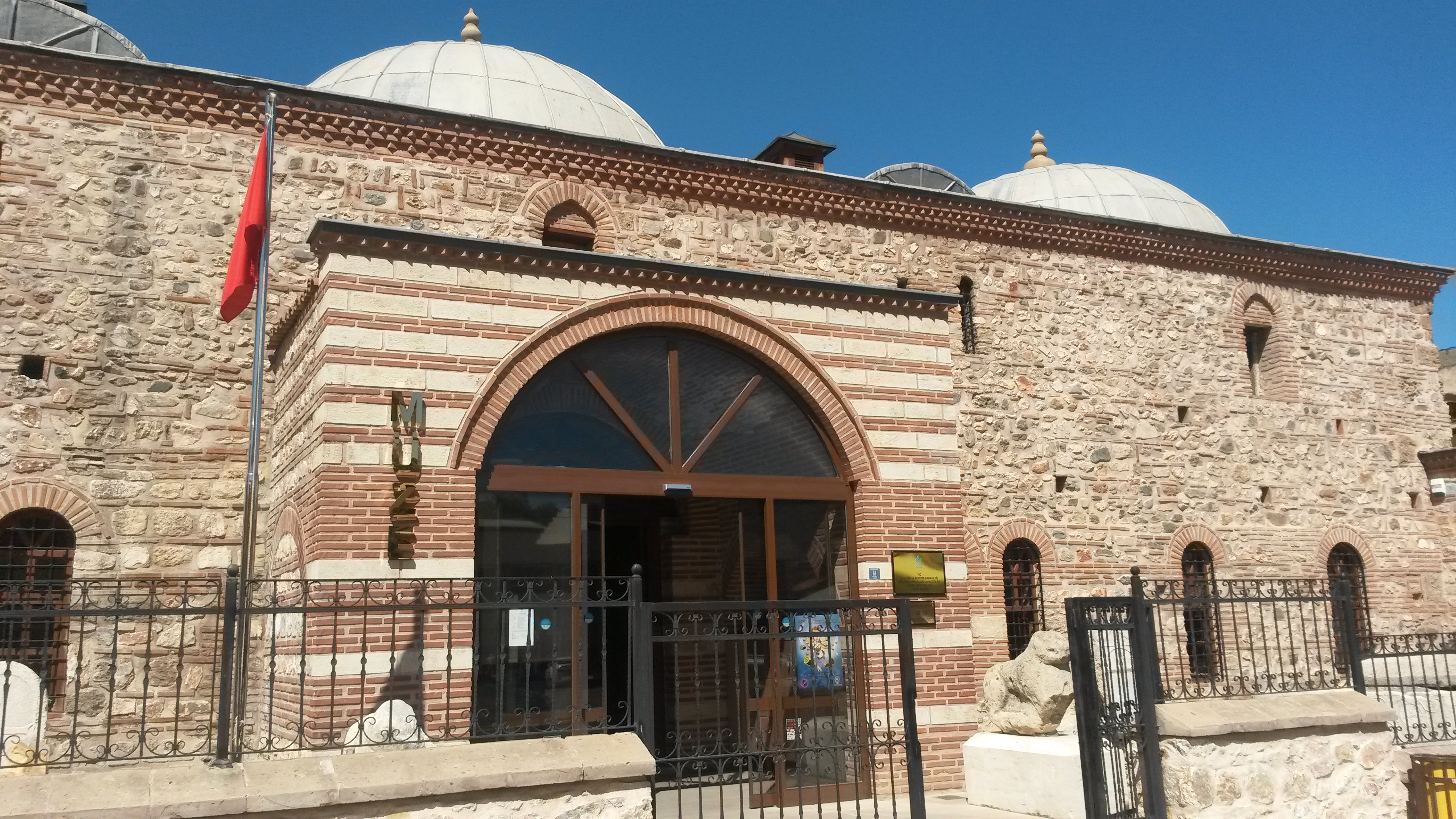 Tokat Müzesi 2012 yılından itibaren Sulusokak'ta bulunan tarihi Arastalı Bedesten binasında bulunmaktadır.